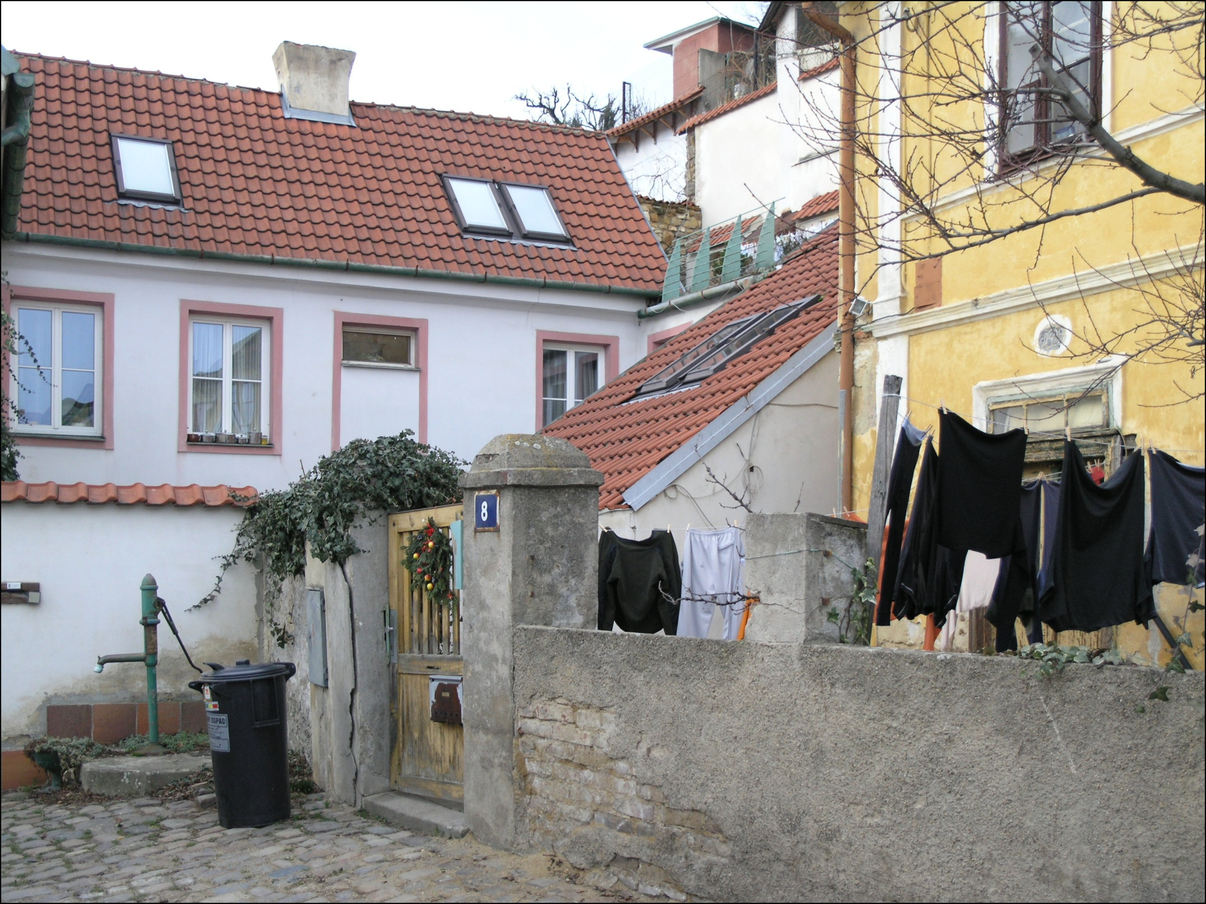 Praha-Střešovice, Na Kocourkách 99/8, pumpa.